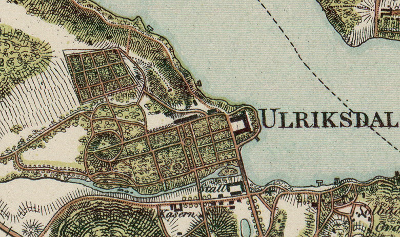 Del av Topografiska corpsens karta visande Ulriksdals slott